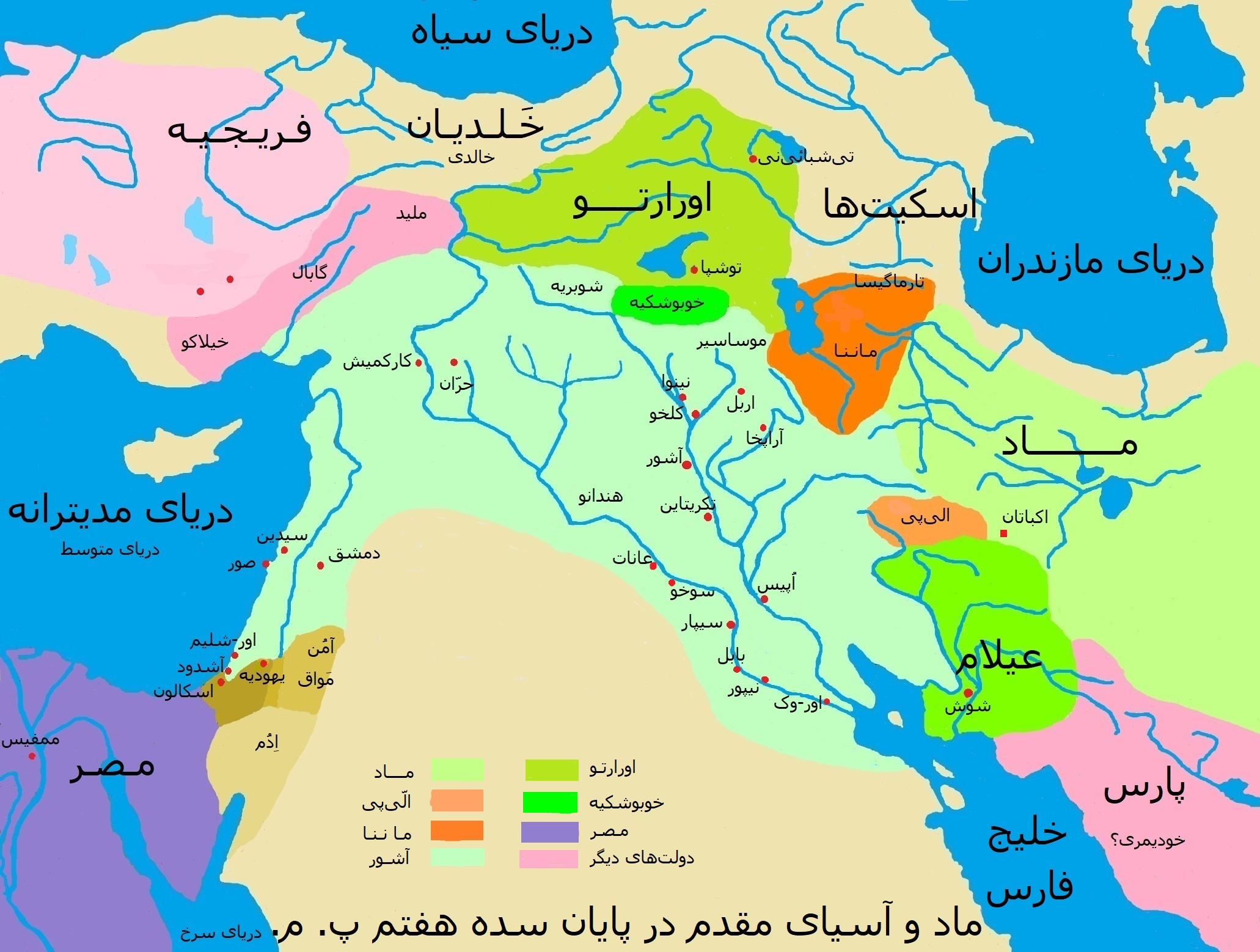 ماد و آسیای مقدم (قفقاز) در قرن ششم پیش از میلاد